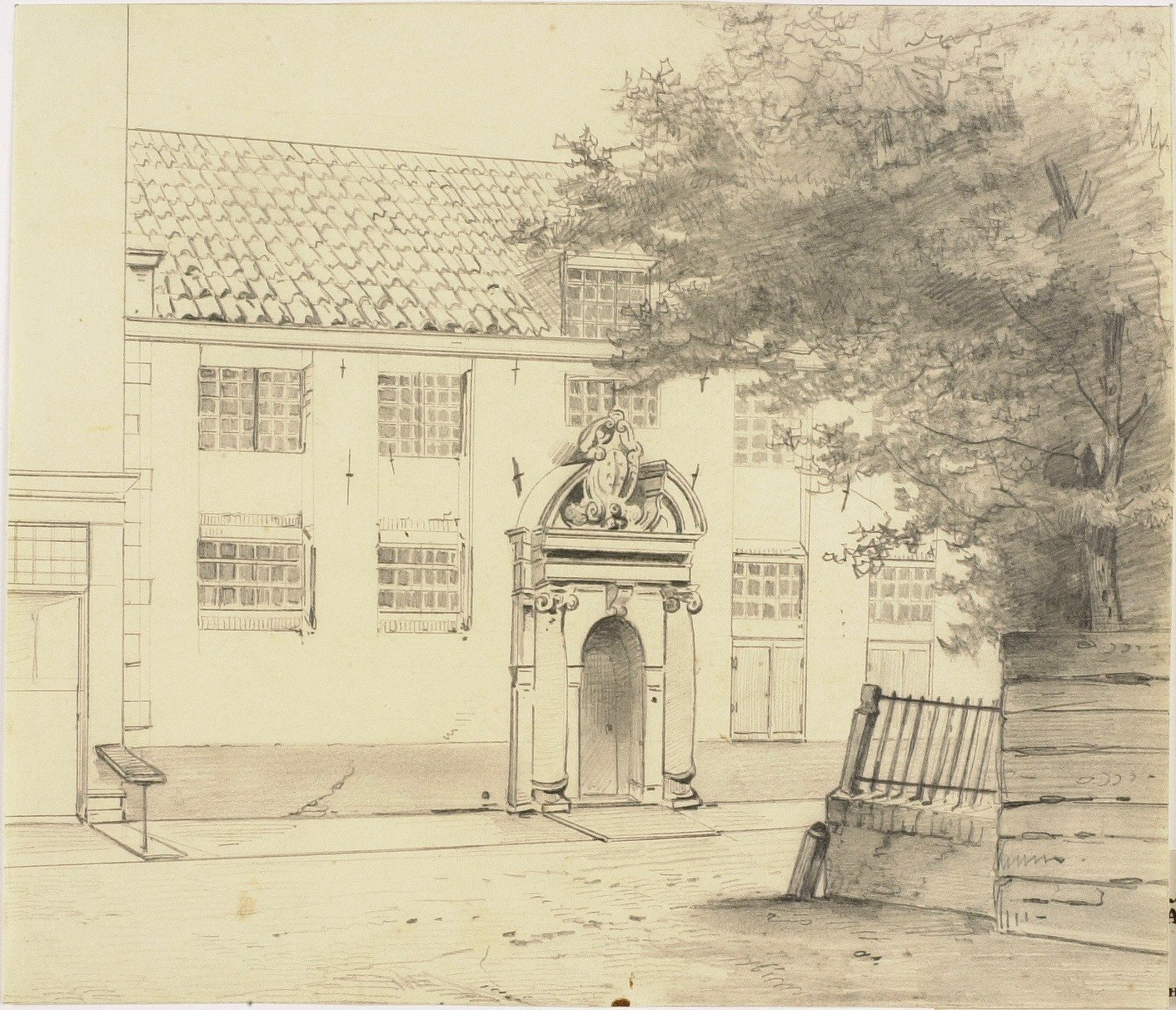 Gegevens cataloguskaartje: Latijnse School (Jacobijnestraat). Potloodtekening van W.Verschuur Jr, 1863. h.21, br.25 cm. KHIU 8503. NB. De poort bevindt zich nu op de binnenplaats van het Frans Halsmuseum aan het Groot Heiligland. Herkomst: onbekend. Identificatienummer: 53-002381 K